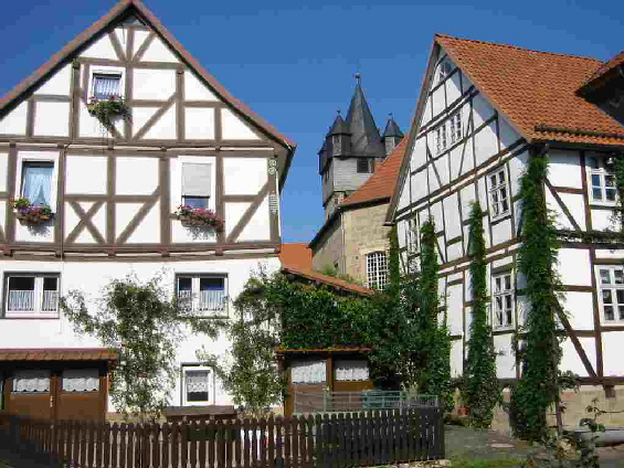 Ortskern Altenstädt: "Alte Schule" (rechts) und ev. Kirche